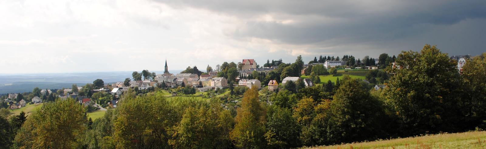 Schöneck (Vogtland) Ansciht vom IFA-Ferienpark